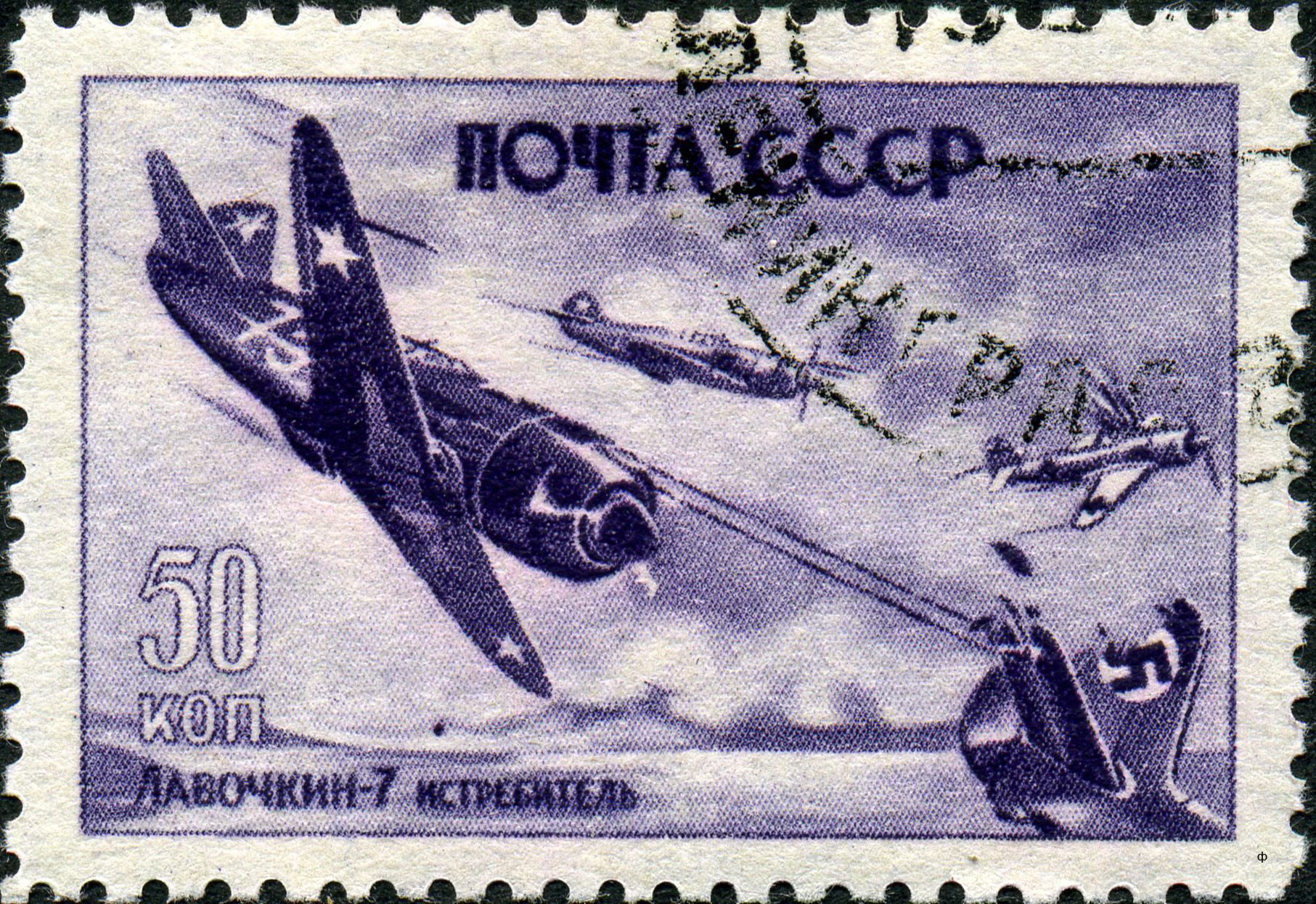 Марка СССР